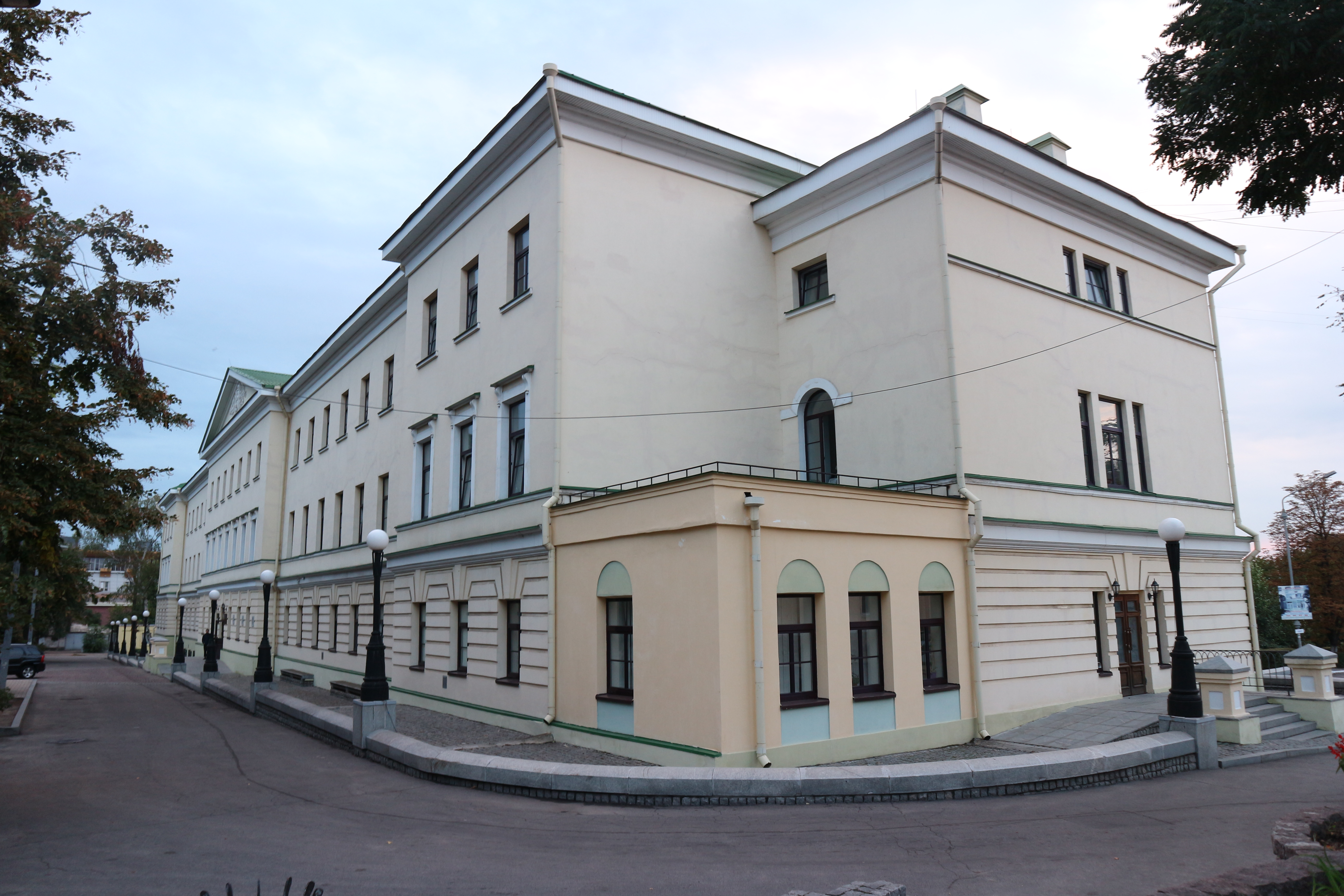 Вікі любить пам'ятки